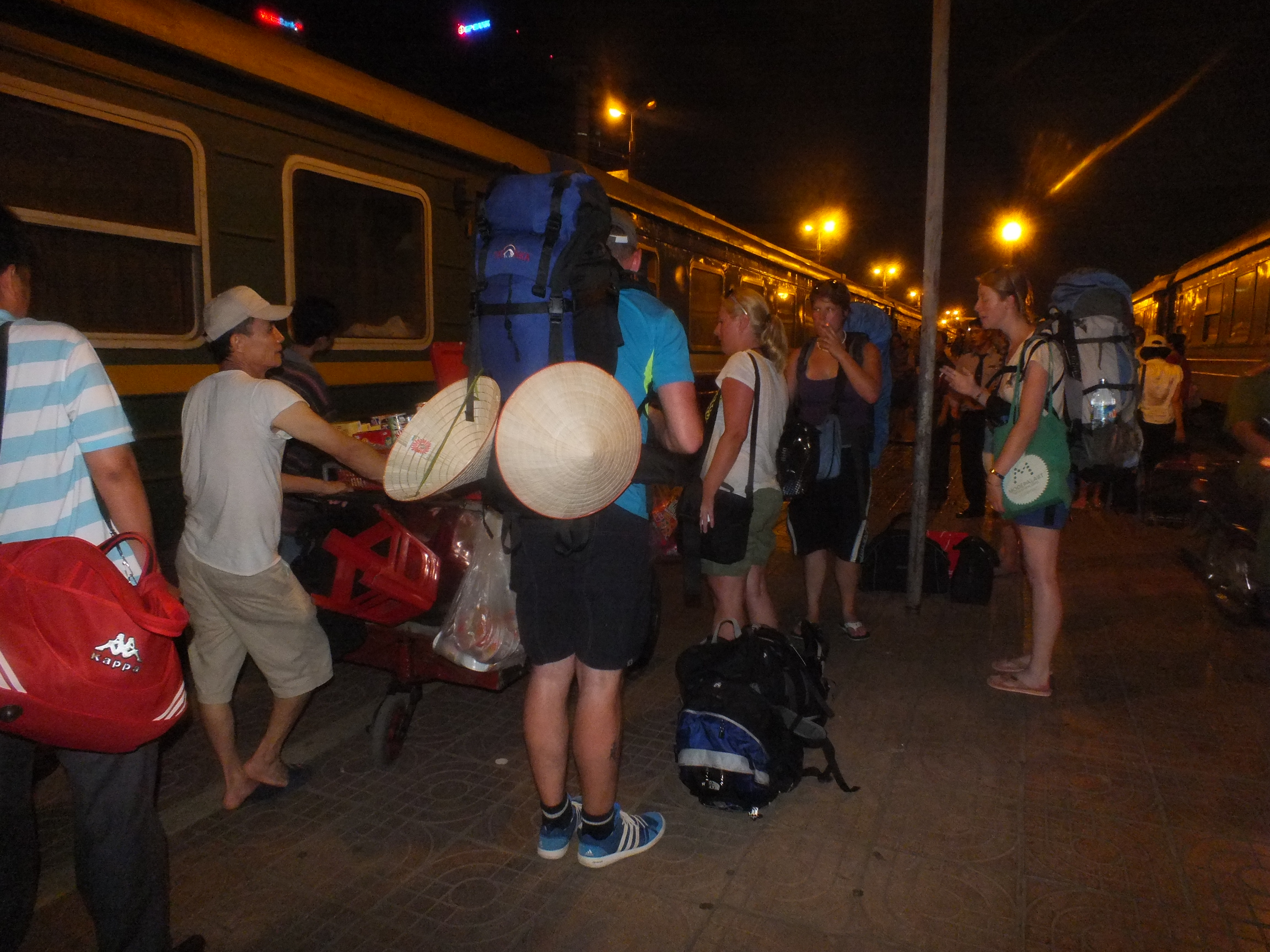 2013-07-15 Ga Ha Noi(Hanoi Station)ハノイ駅